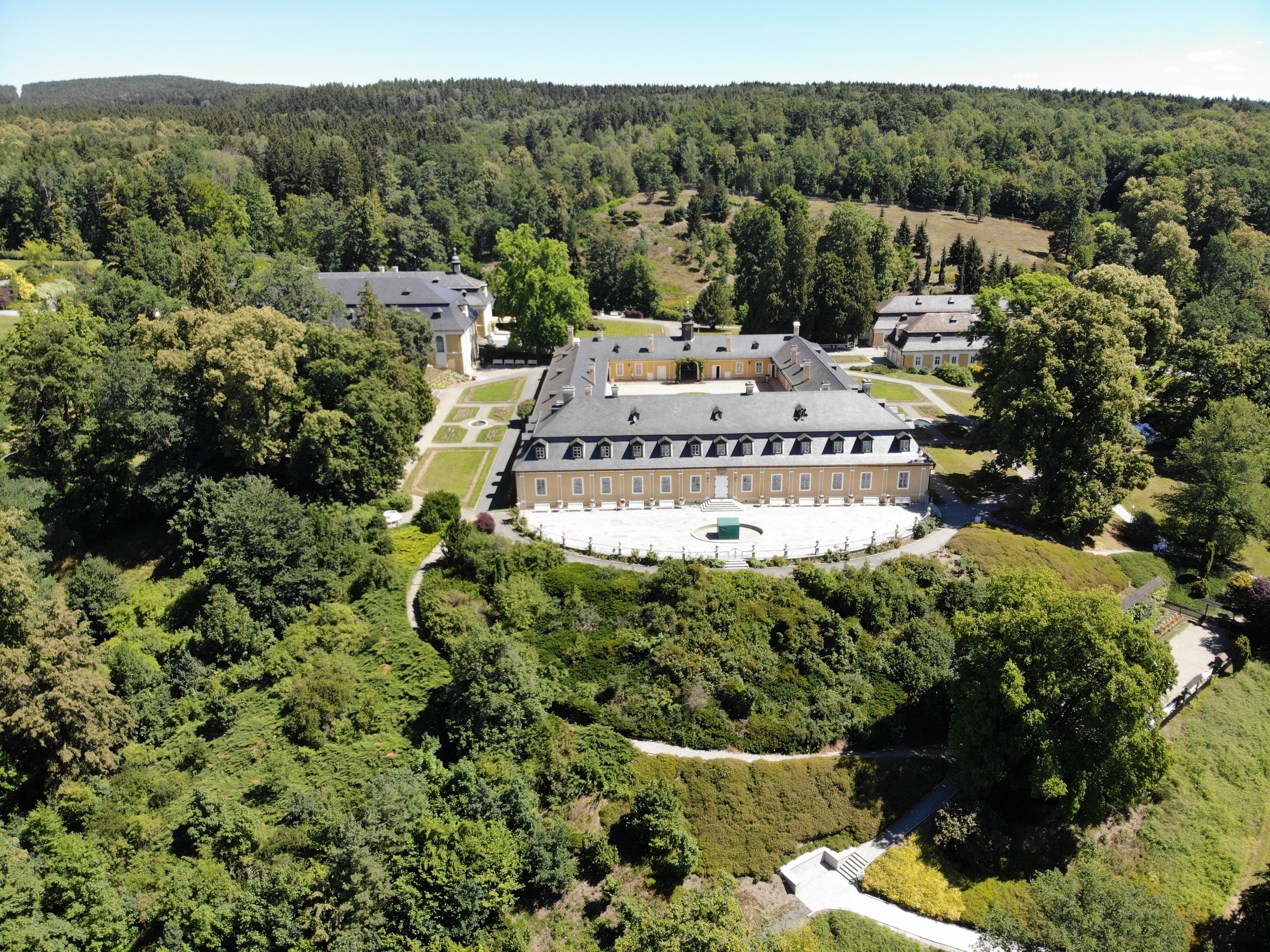 Zámek kozel z ptačí perspektivy